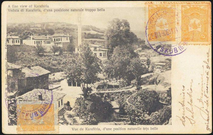 Панорама на Бер с Баир джами